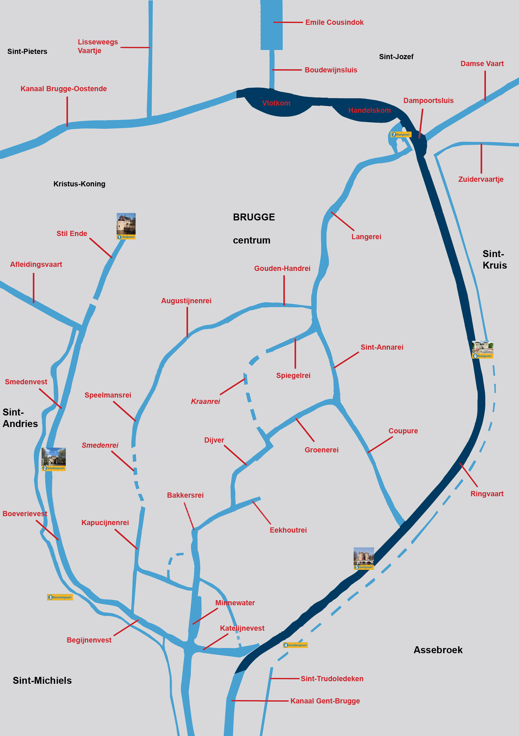 Ringvaart Brugge (donkerblauw)